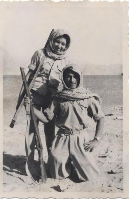 טובה נוה כנערה וחבר בלבוש ערבי מאותה תקופה.